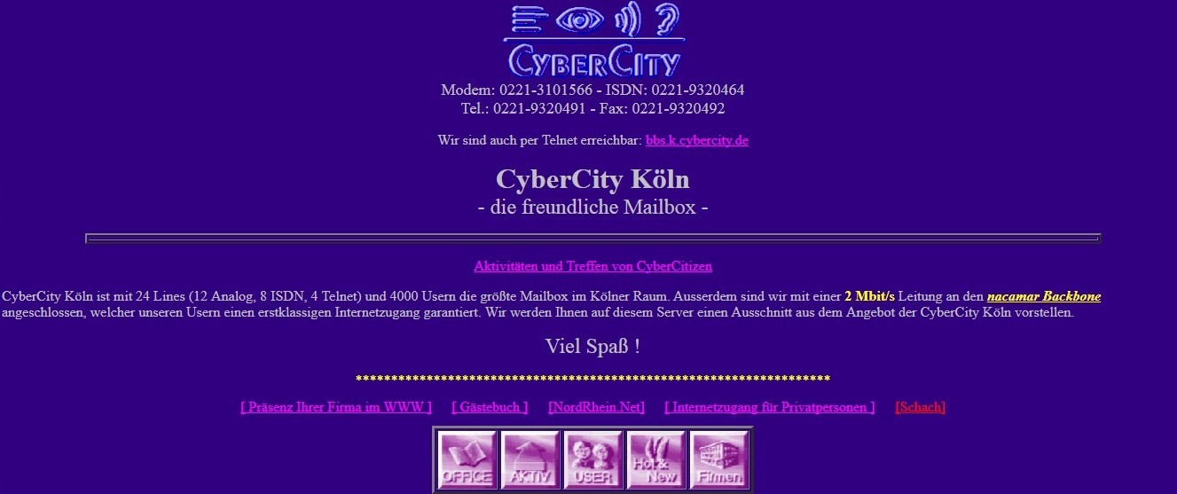 Die Webseite der "CyberCity Köln" aus dem Jahr 1997, an der TeleSchach mit dem Schachforum beteiligt war.